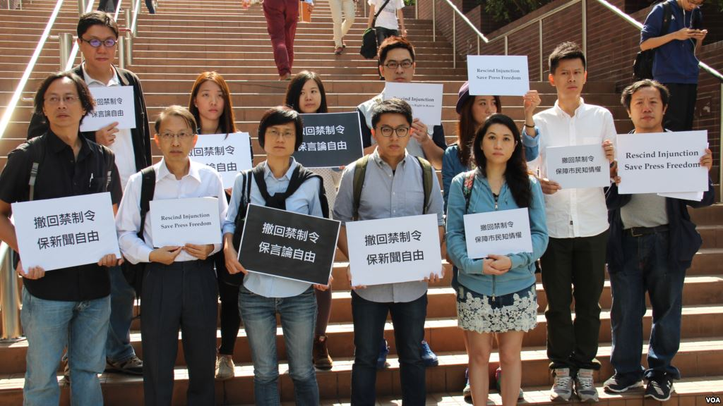 香港七大傳媒團體抗議港大禁制令損害新聞自由。（美國之音海彥攝）